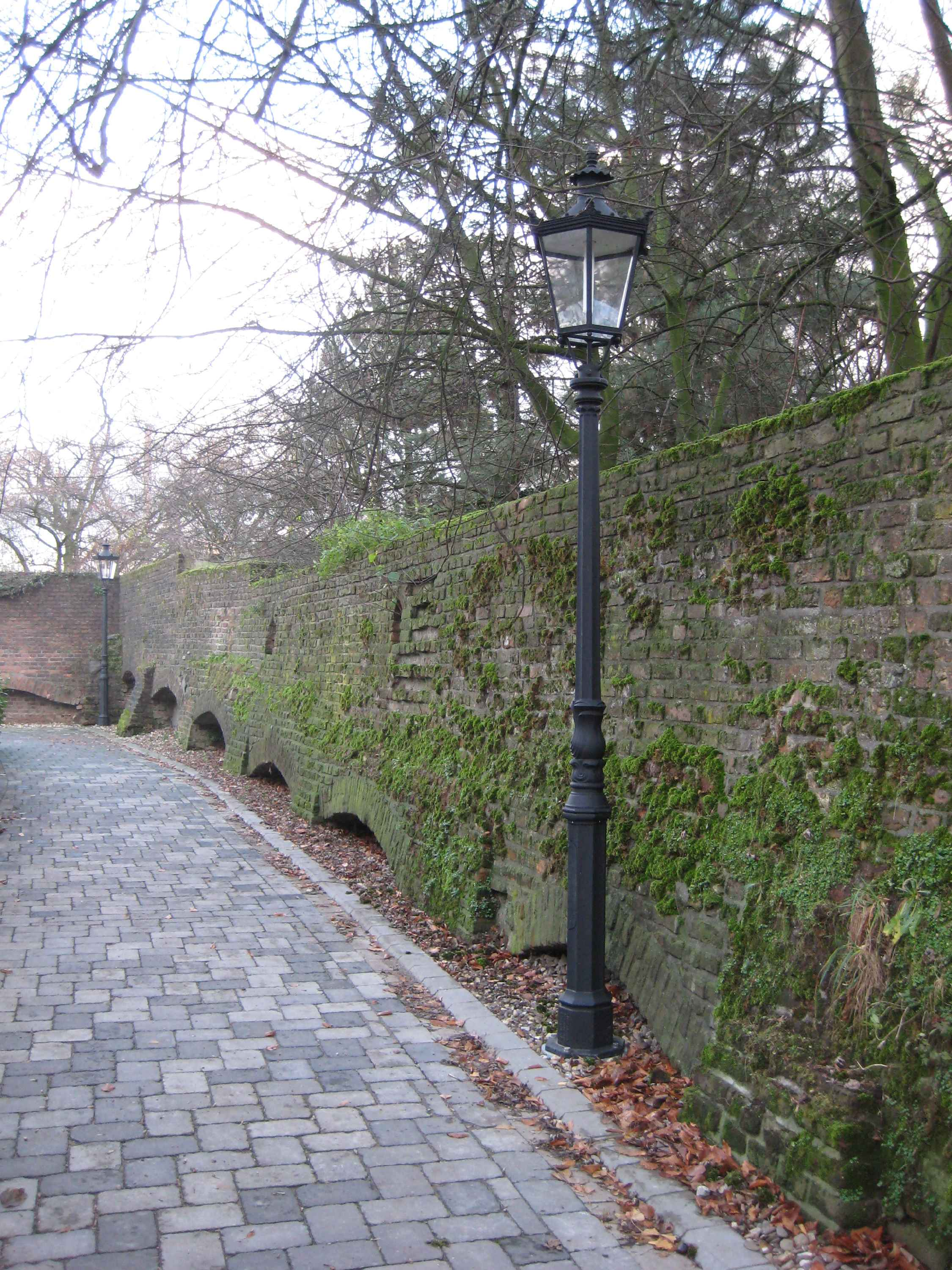 Orsoy Stadtmauer am blauen Turm